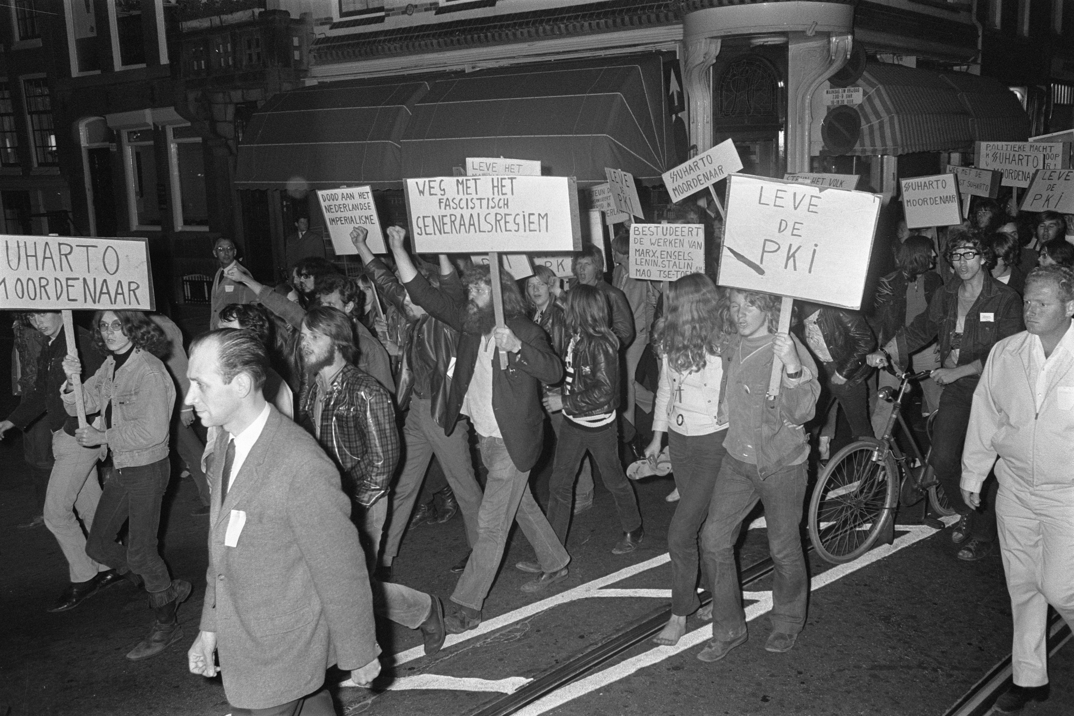 Collectie / Archief : Fotocollectie Anefo Reportage / Serie : [ onbekend ] Beschrijving : Anti-Soeharto-demonstratie in Amsterdam; Rode Jeugd met borden en vuisten Datum : 1 september 1970 Locatie : Amsterdam, Noord-Holland Trefwoorden : demonstraties, staatsbezoeken Persoonsnaam : Rode Jeugd, Soeharto Fotograaf : Koch, Eric / Anefo Auteursrechthebbende : Nationaal Archief Materiaalsoort : Negatief (zwart/wit) Nummer archiefinventaris : bekijk toegang 2.24.01.05 Bestanddeelnummer : 923-8042